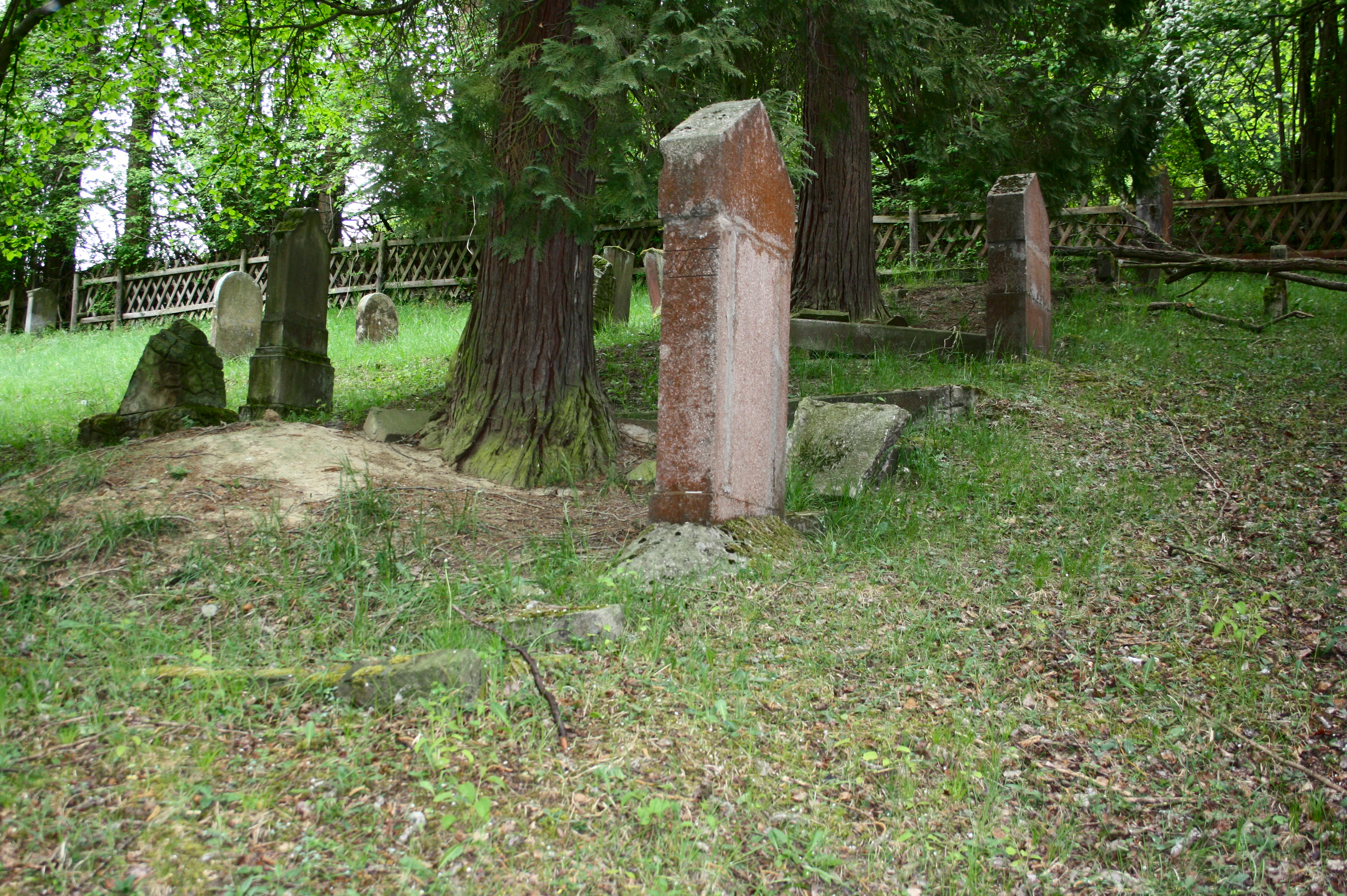 Jüdischer Friedhof, Rheinbrohl, Landkreis Neuwied, Rheinland-Pfalz, Deutschland